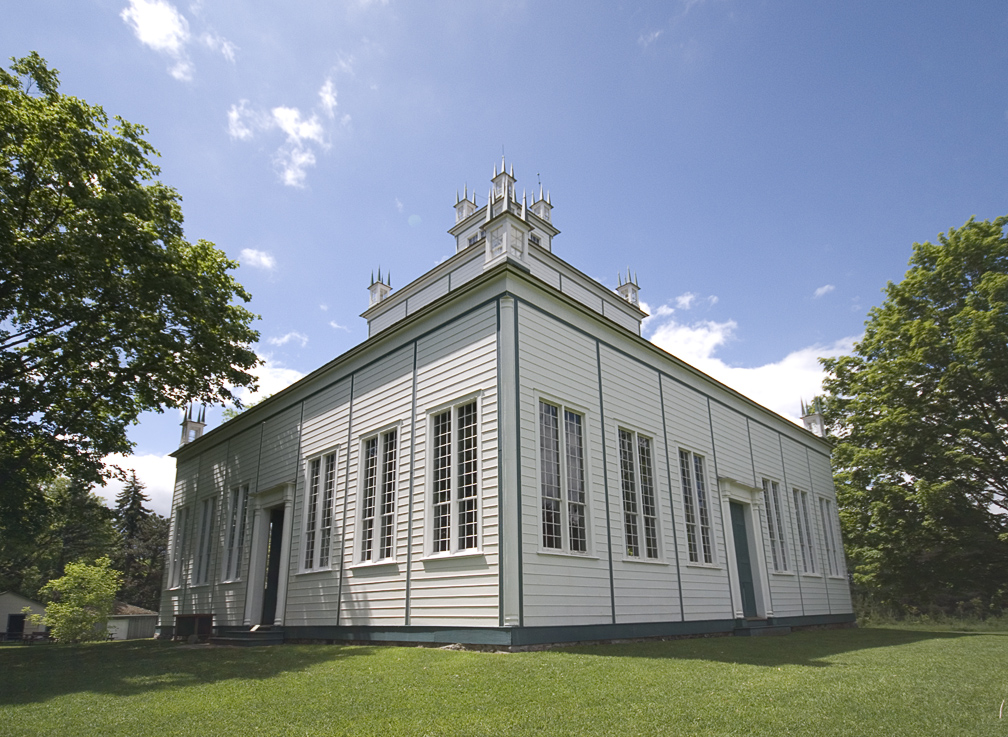 sharon-02